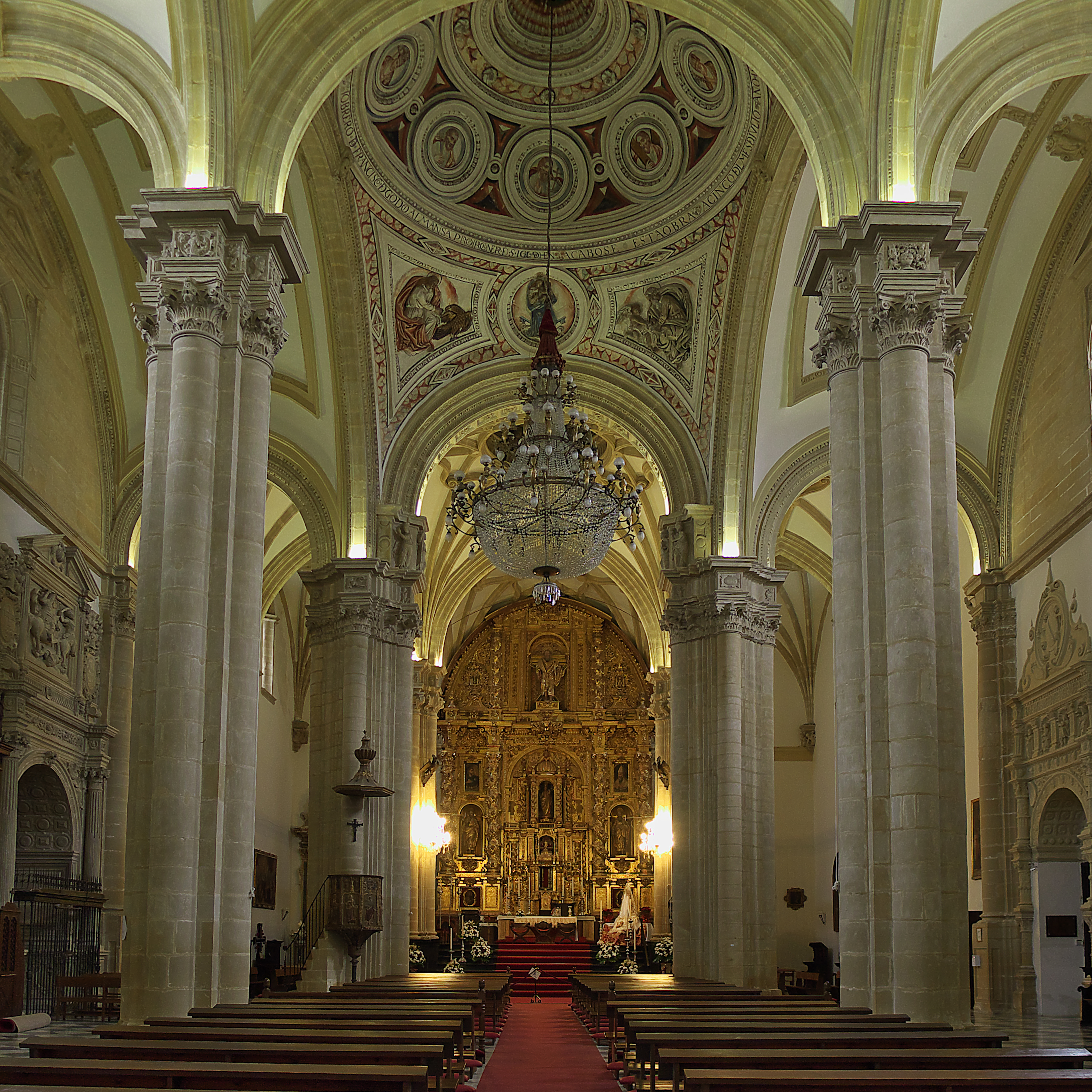 El terremoto de 18 de Febrero de 1567 dañó considerablemente la obra del maestro Andrés de Vandelvira (ca. 1540-1567). A la muerte de Vandelvira (†1575), Alonso Barba y Francisco del Castillo el Mozo continuaron la obra (1575-1584).